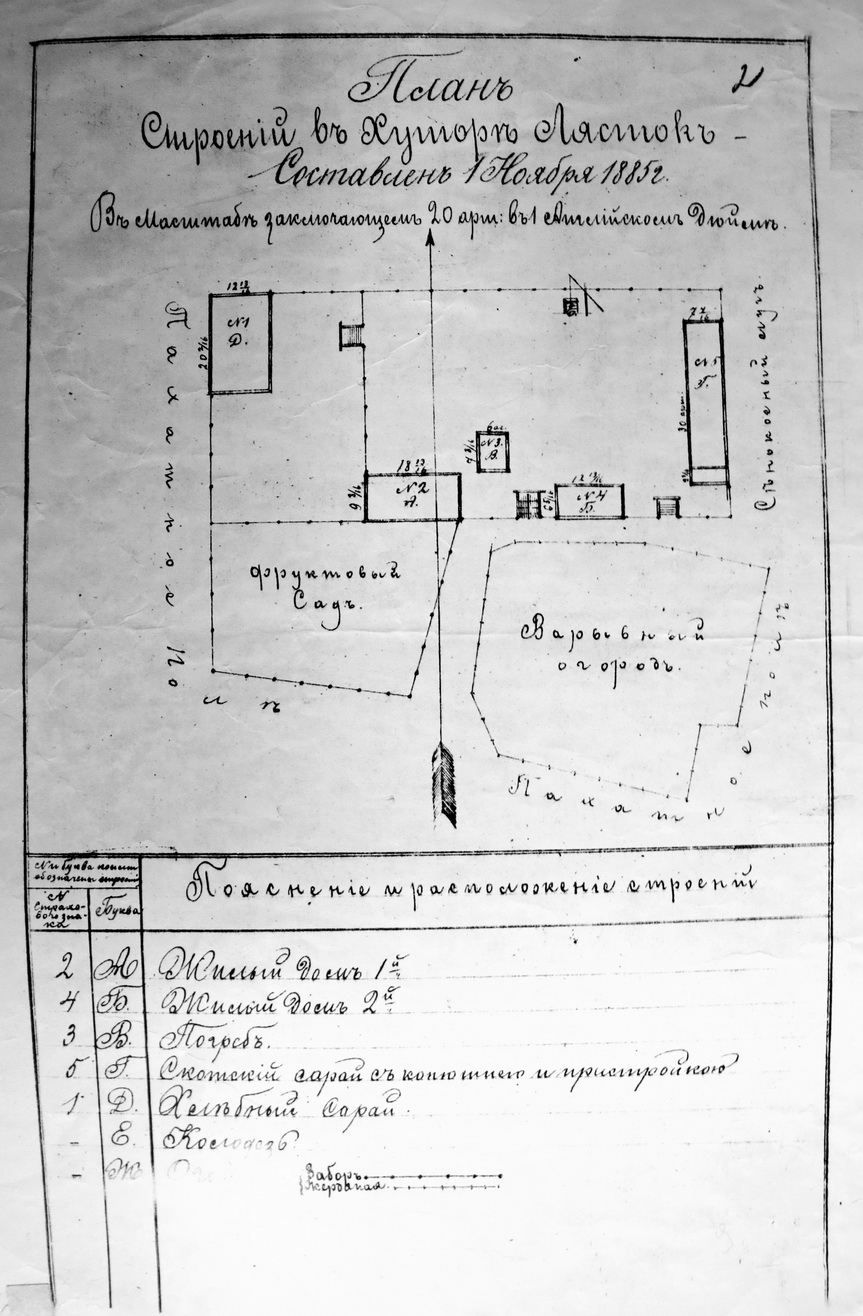 Беларуская (тарашкевіца): Ласток (Łastok). Гісторыя. Графіка і здымкі